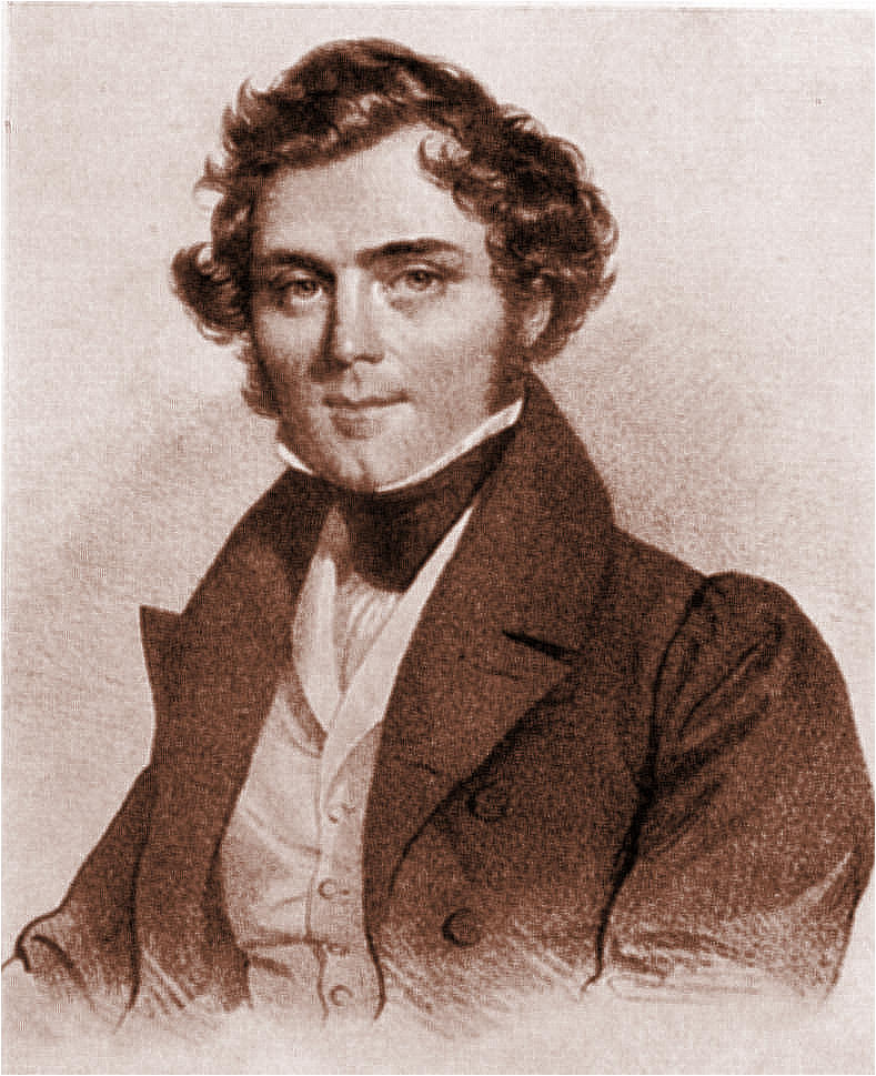 Franz Serafin Exner (1802-1853), österreichischer Philosoph. Lithographie von Josef Kriehuber, 1831